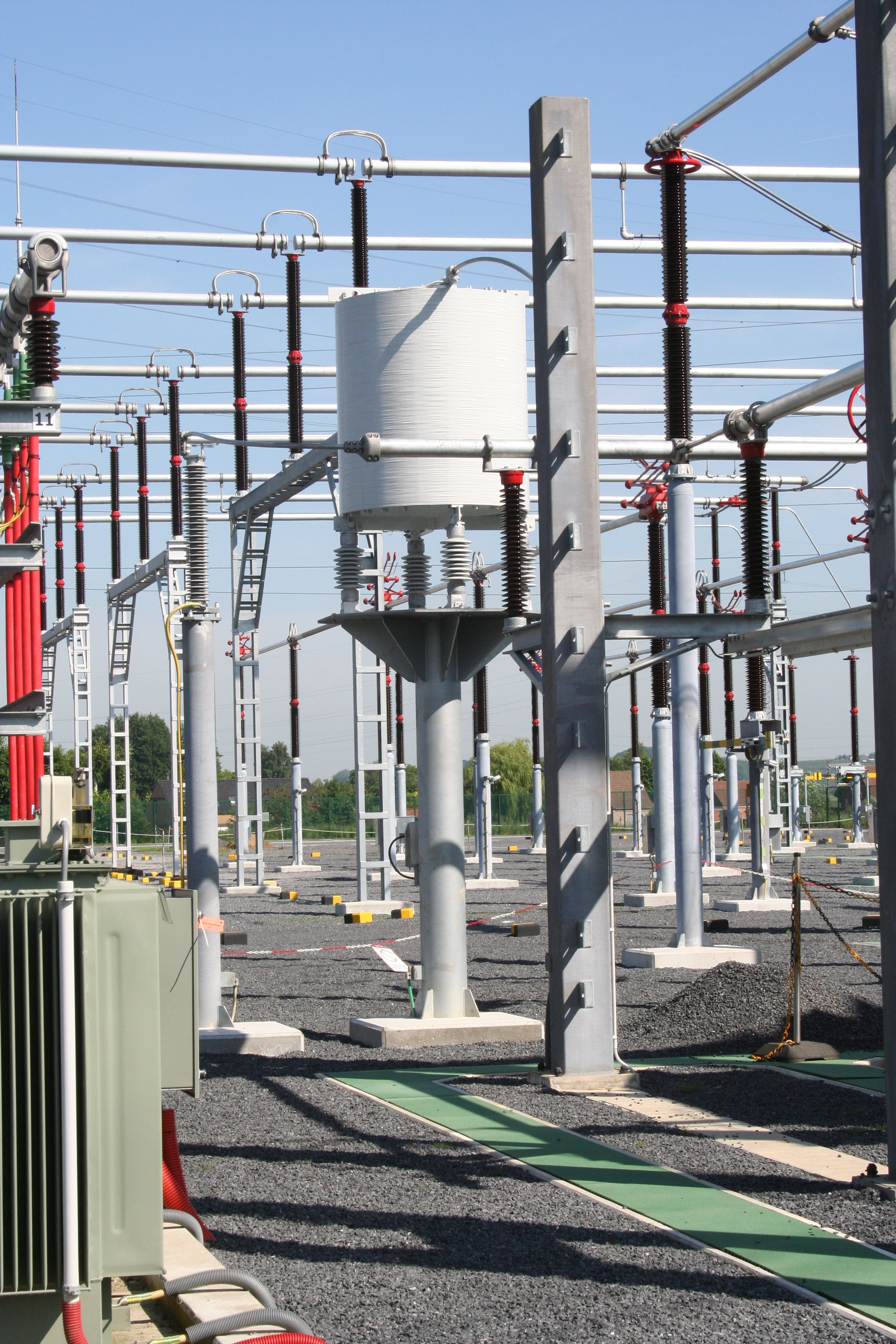 150 kV Nulpuntspoel in ELIA post Avelgem